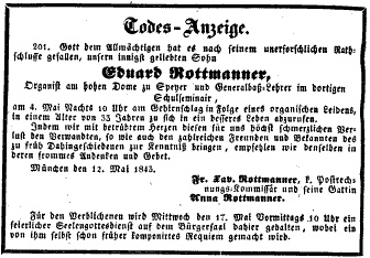 Eduard Rottmanner, Komponist, Todesanzeige, 1843